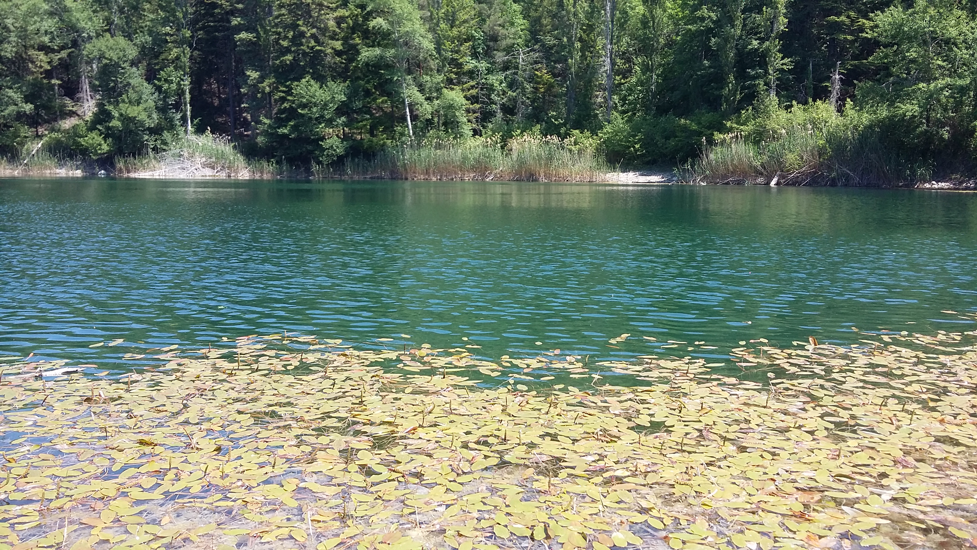 Si incontra percorrendo la Nona Tappa del Cammino Naturale dei Parchi